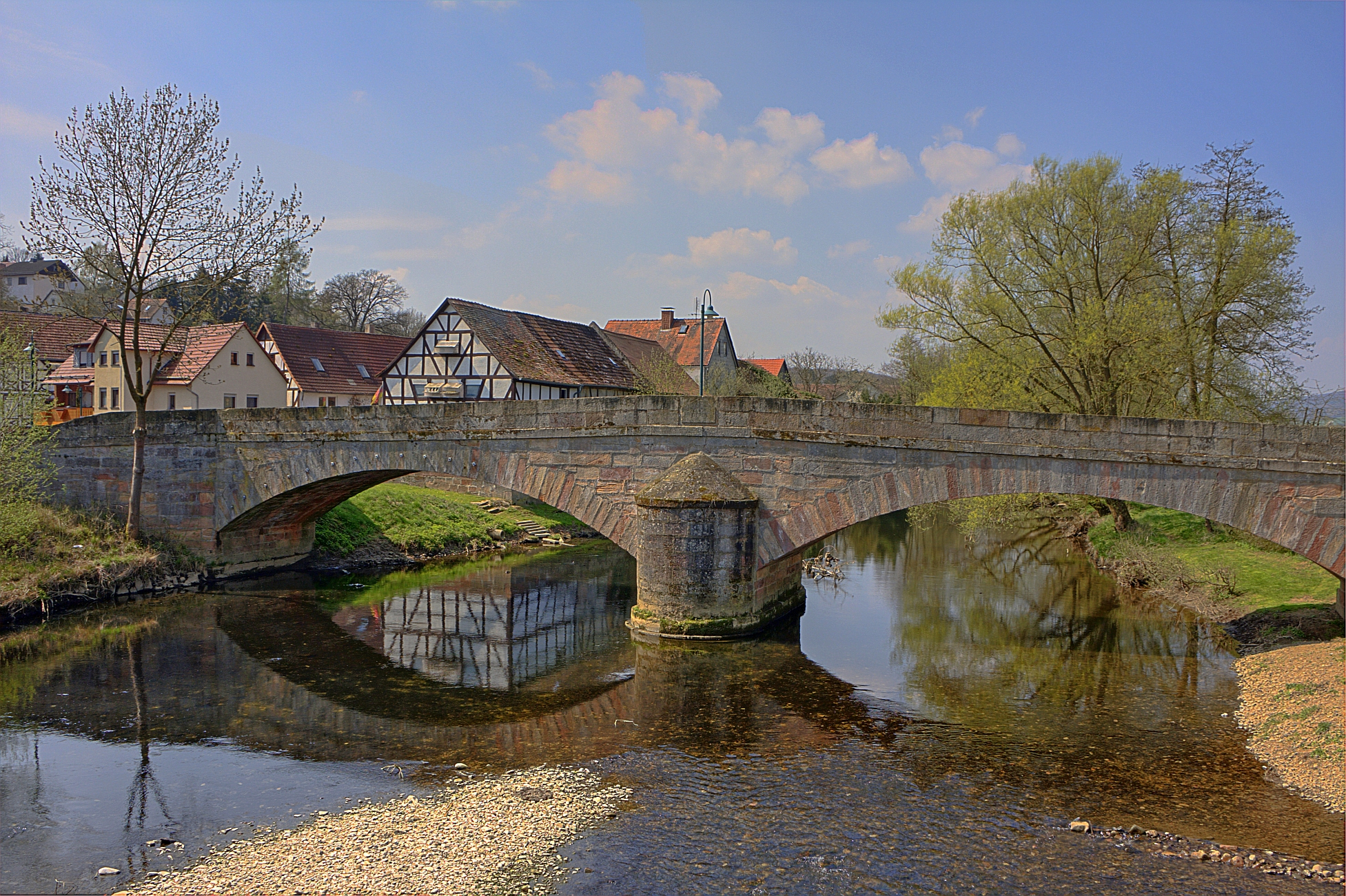 Blick auf die alte Goßfeldener Lahnbrücke.